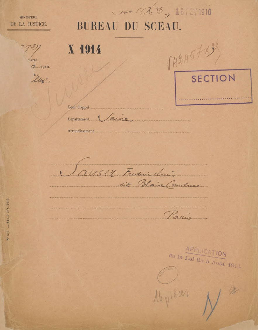 Dossier de naturalisation de Frédéric Louis Sauser, dit Blaise Cendrars, en application de la loi sur la naturalisation des étrangers, votée le 4 août 1914